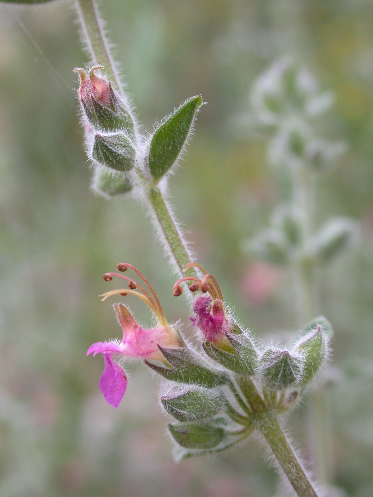 Teucrium divaricatum Heldr. (געדה מפושקת), Mount Carmel, Israel.